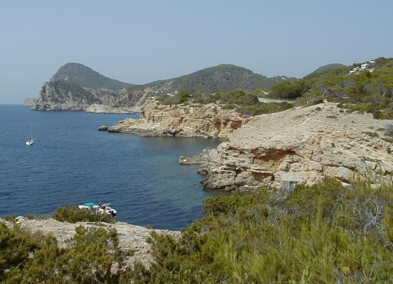 Meeresbucht auf Ibiza, Cala De Sa Galera mit dem Puig Nuno im Hintergrund.